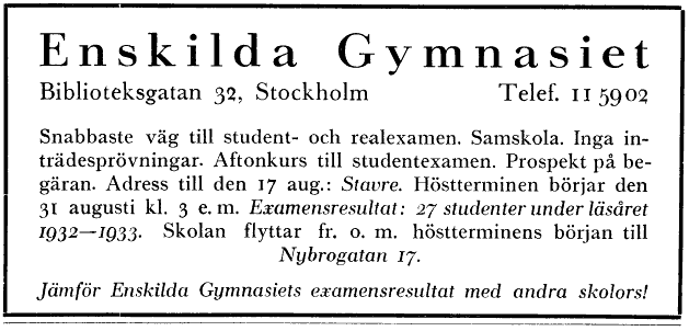 Annons för Enskilda gymnasiet, Stockholm / Advertisement för Enskilda college school, Stockholm